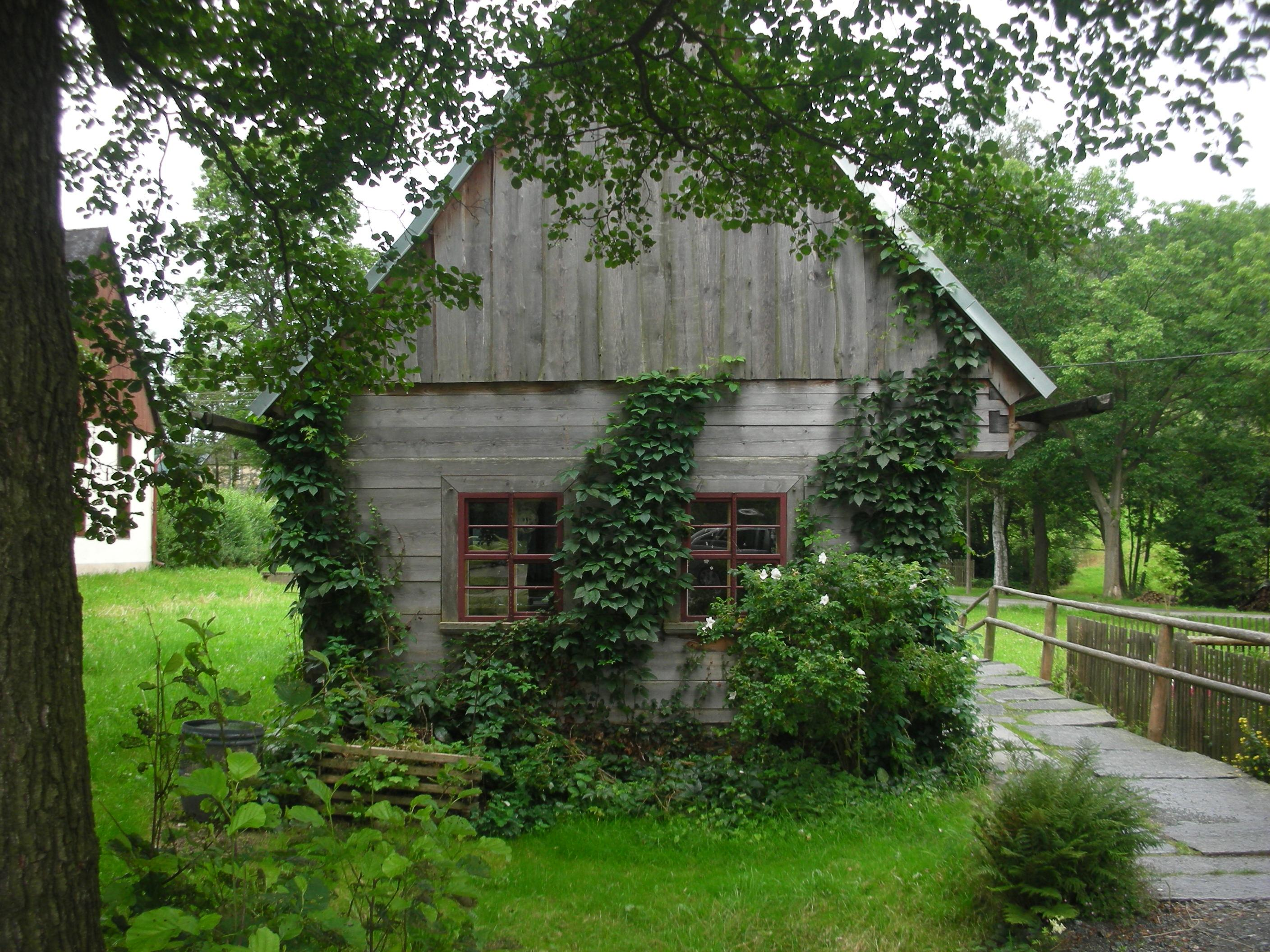 Kassenhaus im Freilichtmuseum Eubabrunn bei Erblach(Vogtland)